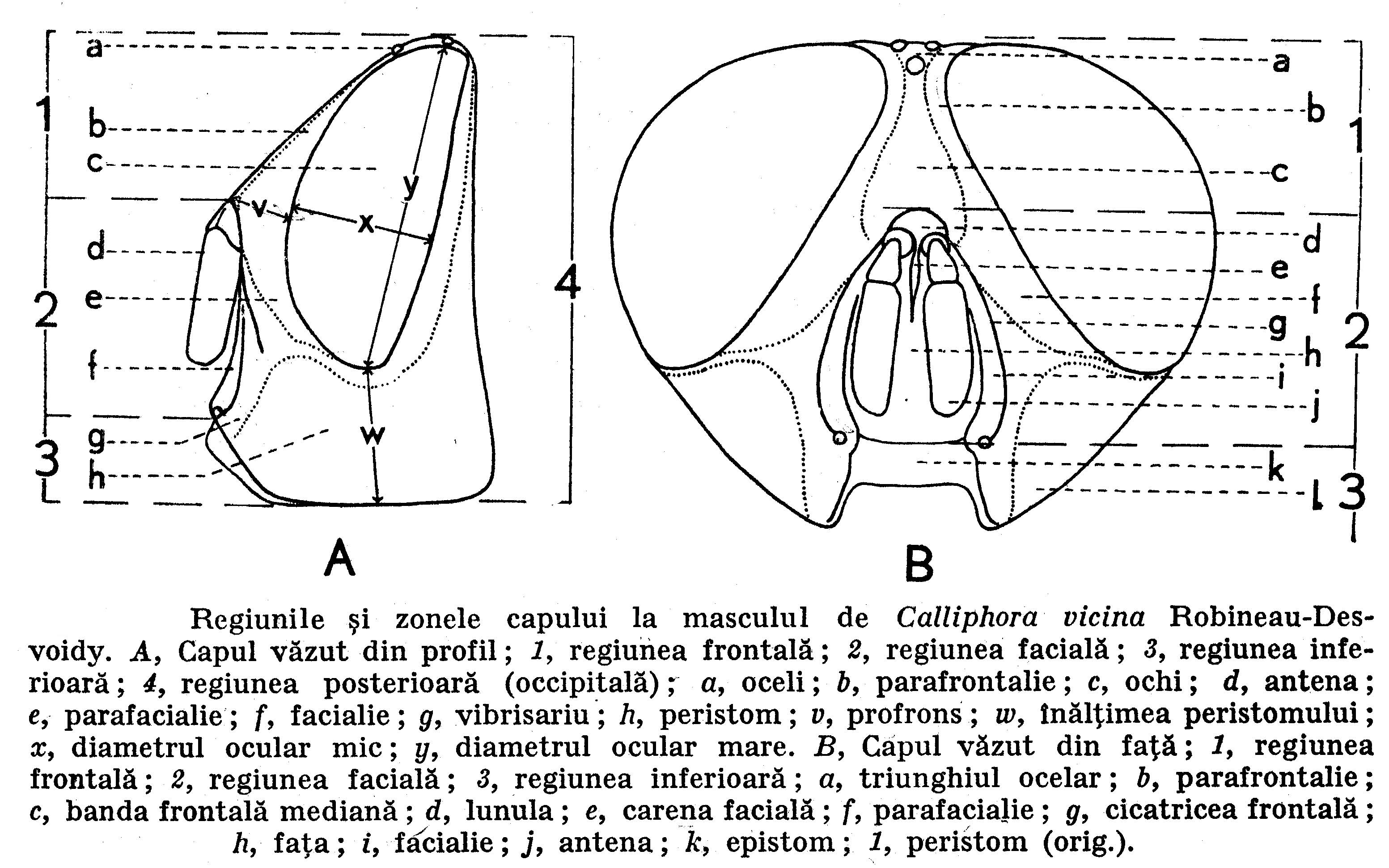 Regiunile și zonele capului la mascul